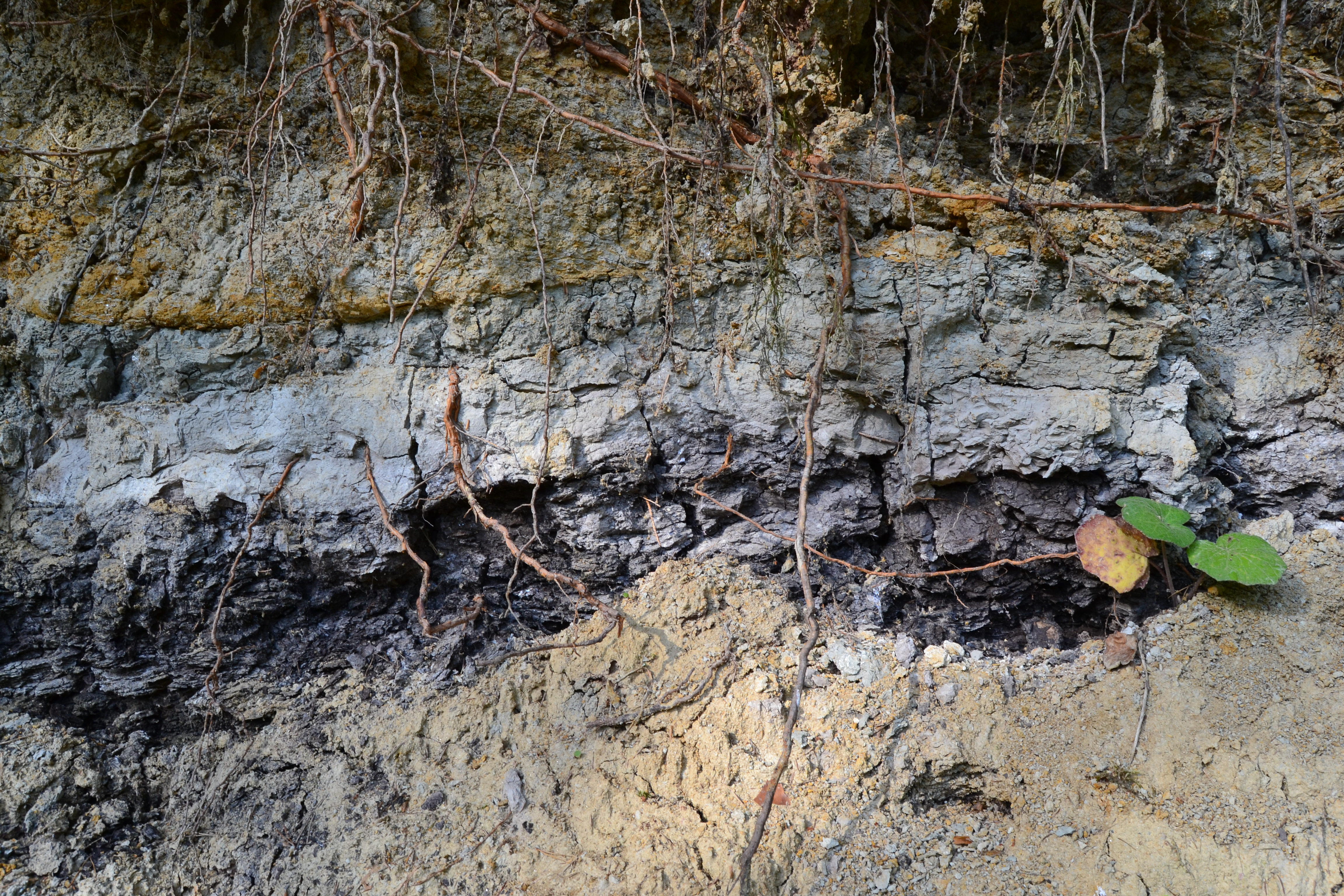 Schieferkohle-Aufschluss